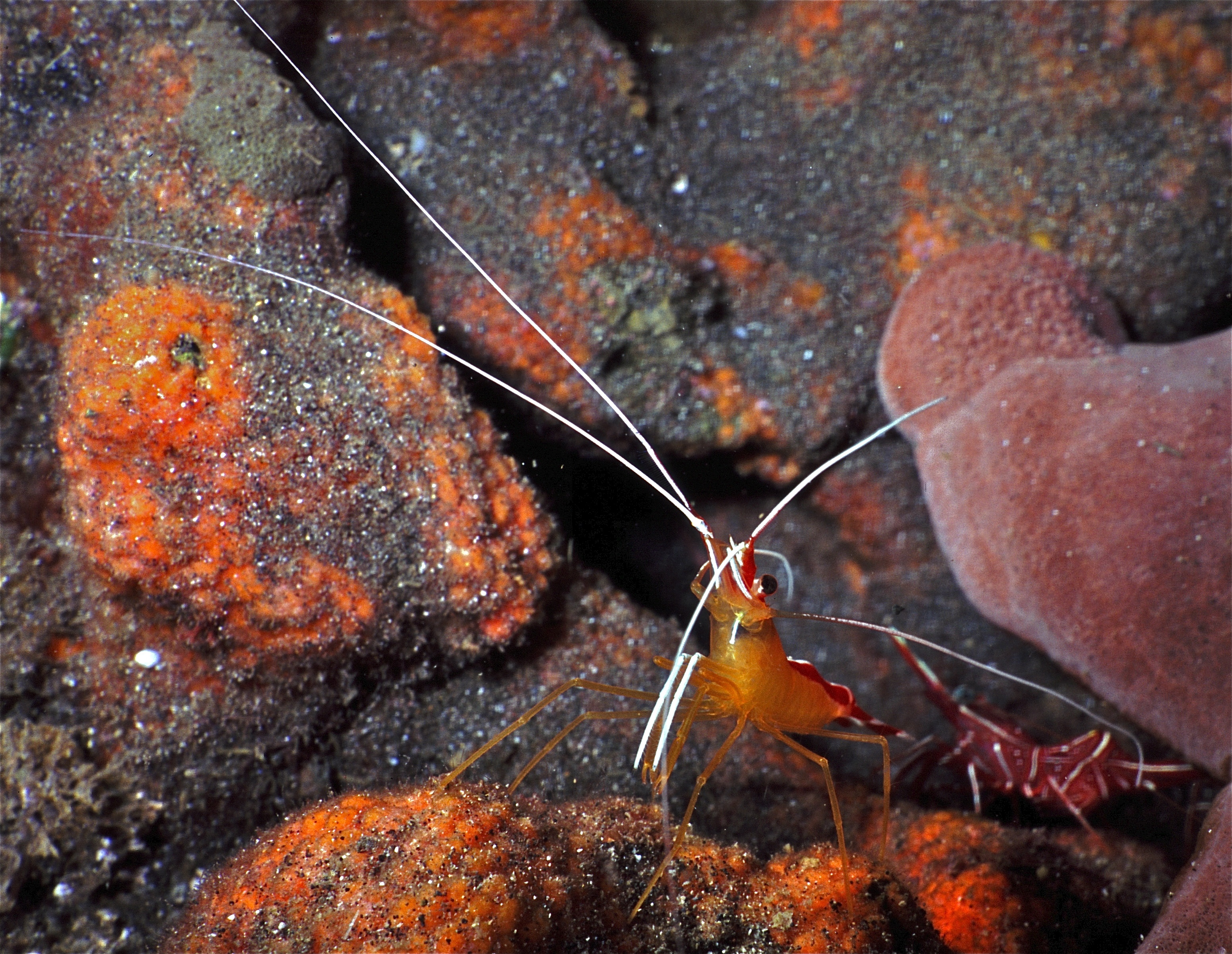 Bunaken, Sulawesi, INDONESIA